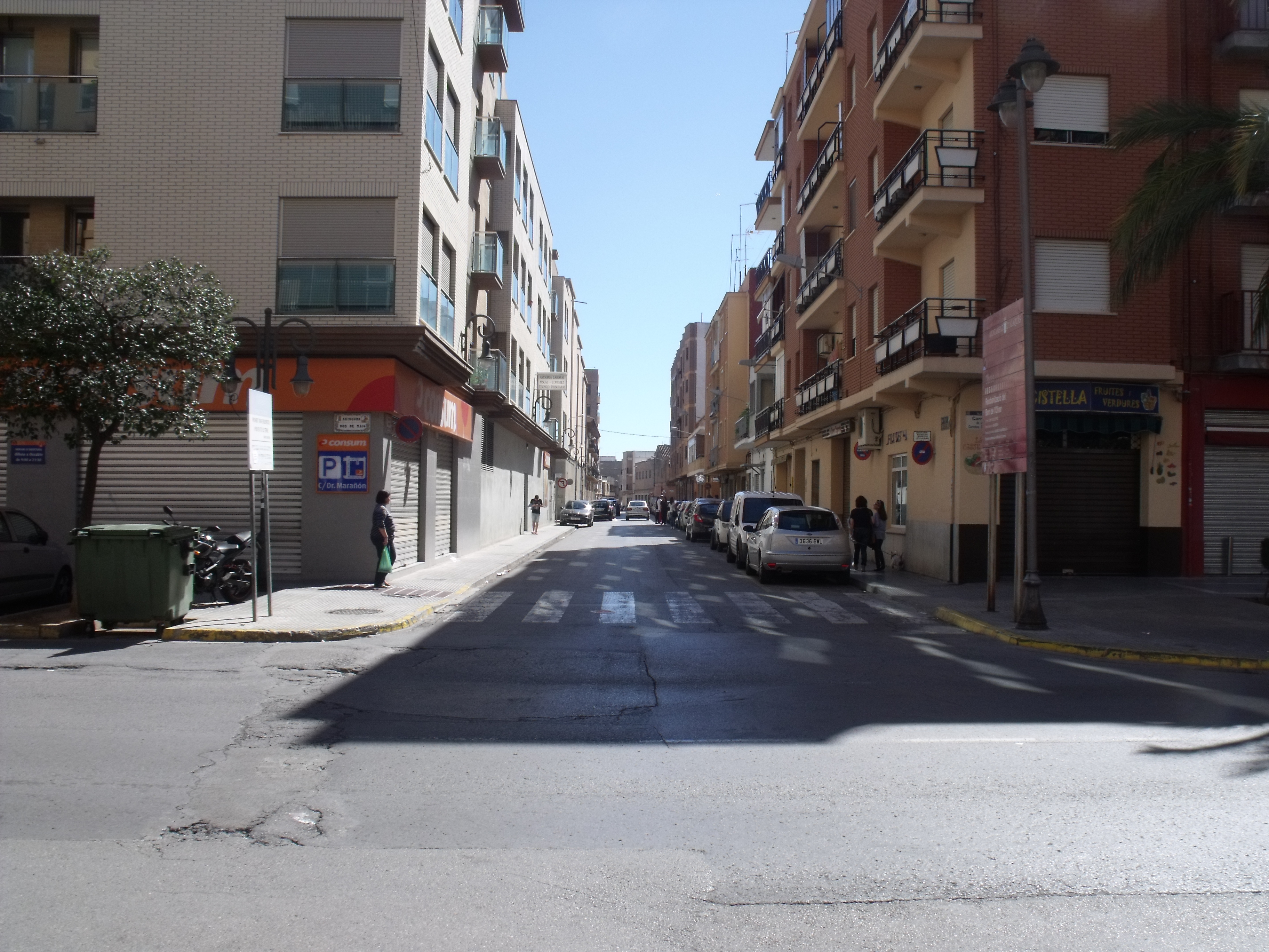 Carrer que separa els termes municipals d'Aldaia i Alaquàs. A Aldaia s'anomena Doctor Severo Ochoa i a Alaquàs Sant Gaietà.